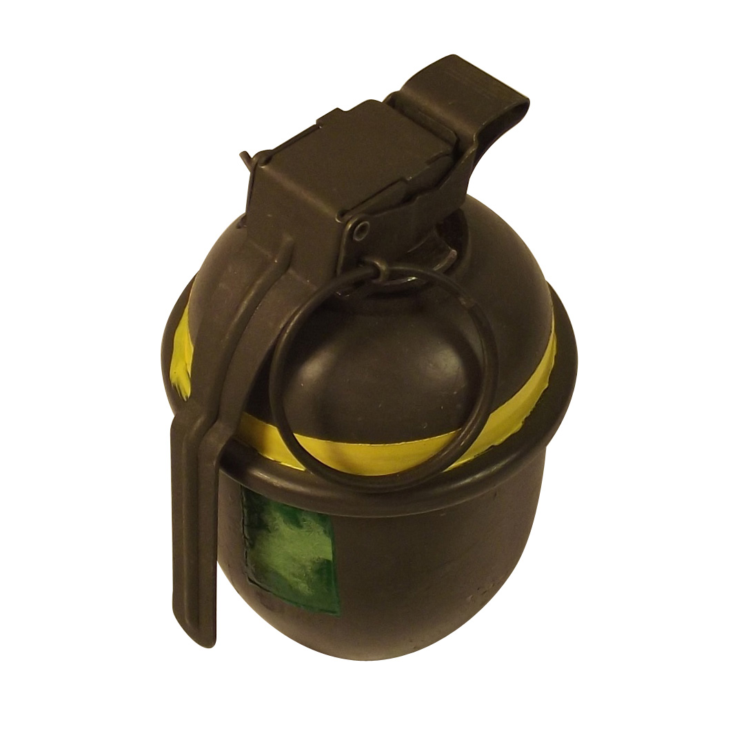 Spränghandgranat m/56, en av handgranaterna i Försvarsmakten.